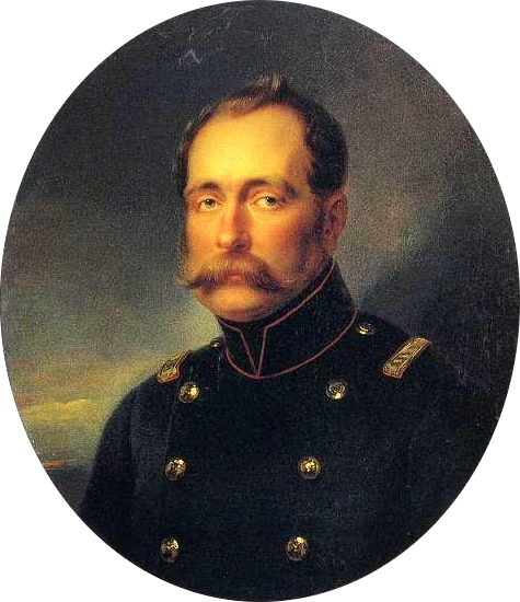 Великий Князь Михаил Павлович, портрет И.Крамского. ГРМ. Ж-2716.